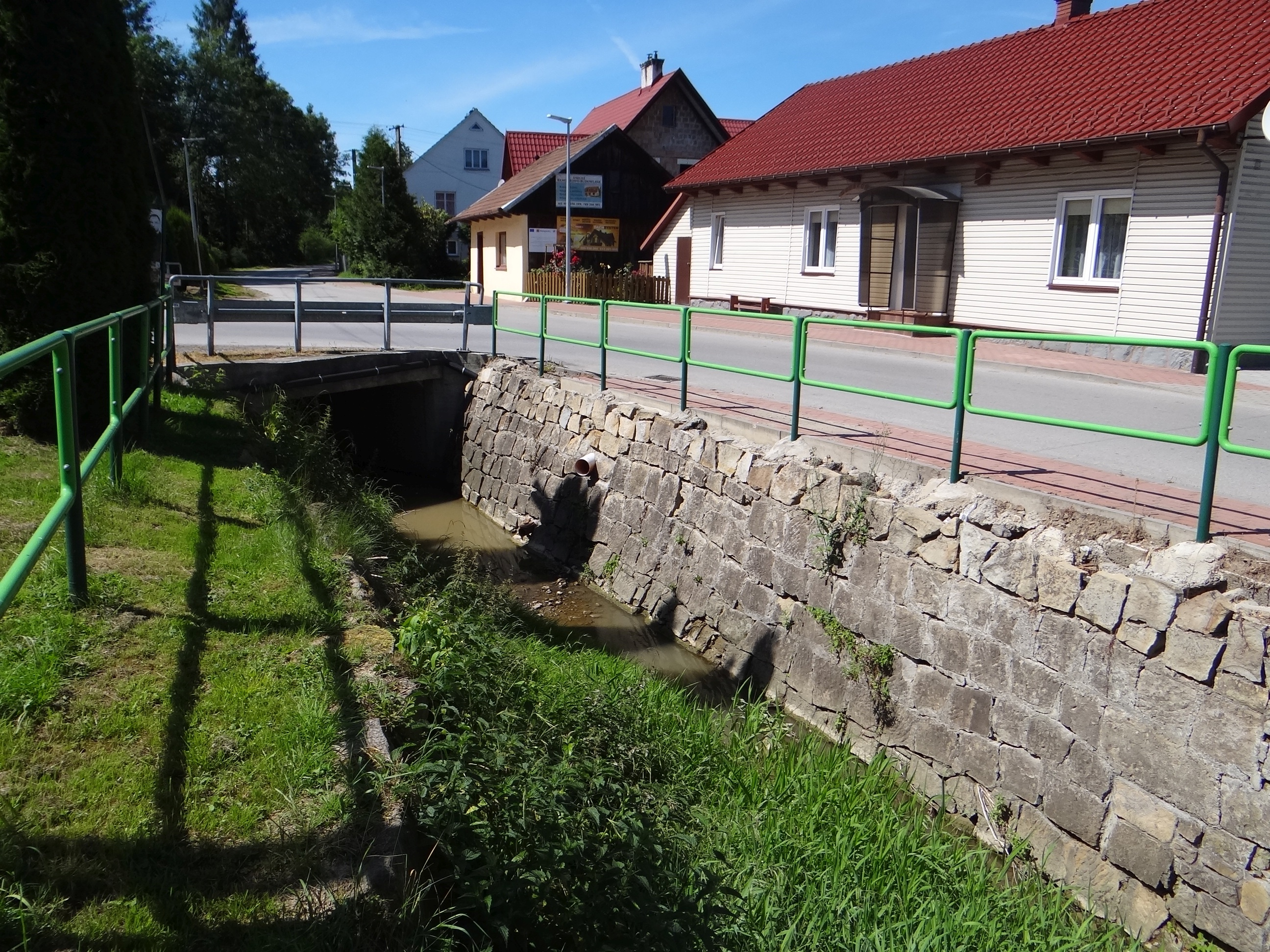 Gruszów (powiat myślenicki). Potok Gruszów